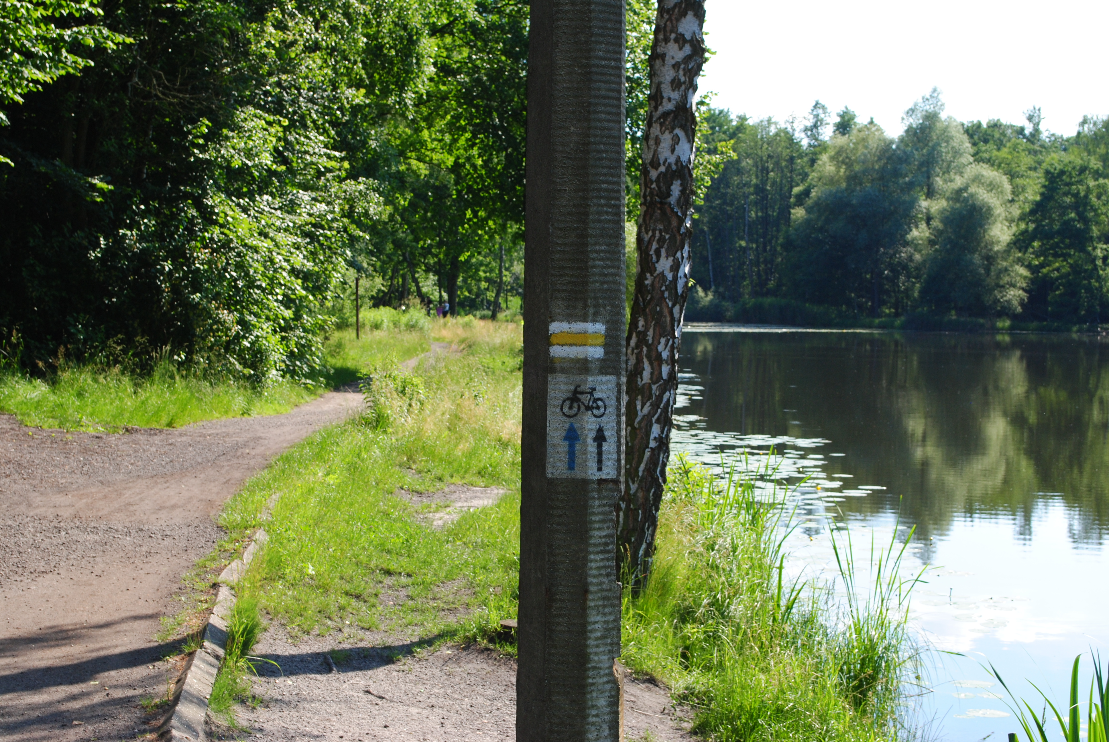 Katowice-Giszowiec. Staw Janina. Ścieżka turystyczna żółta